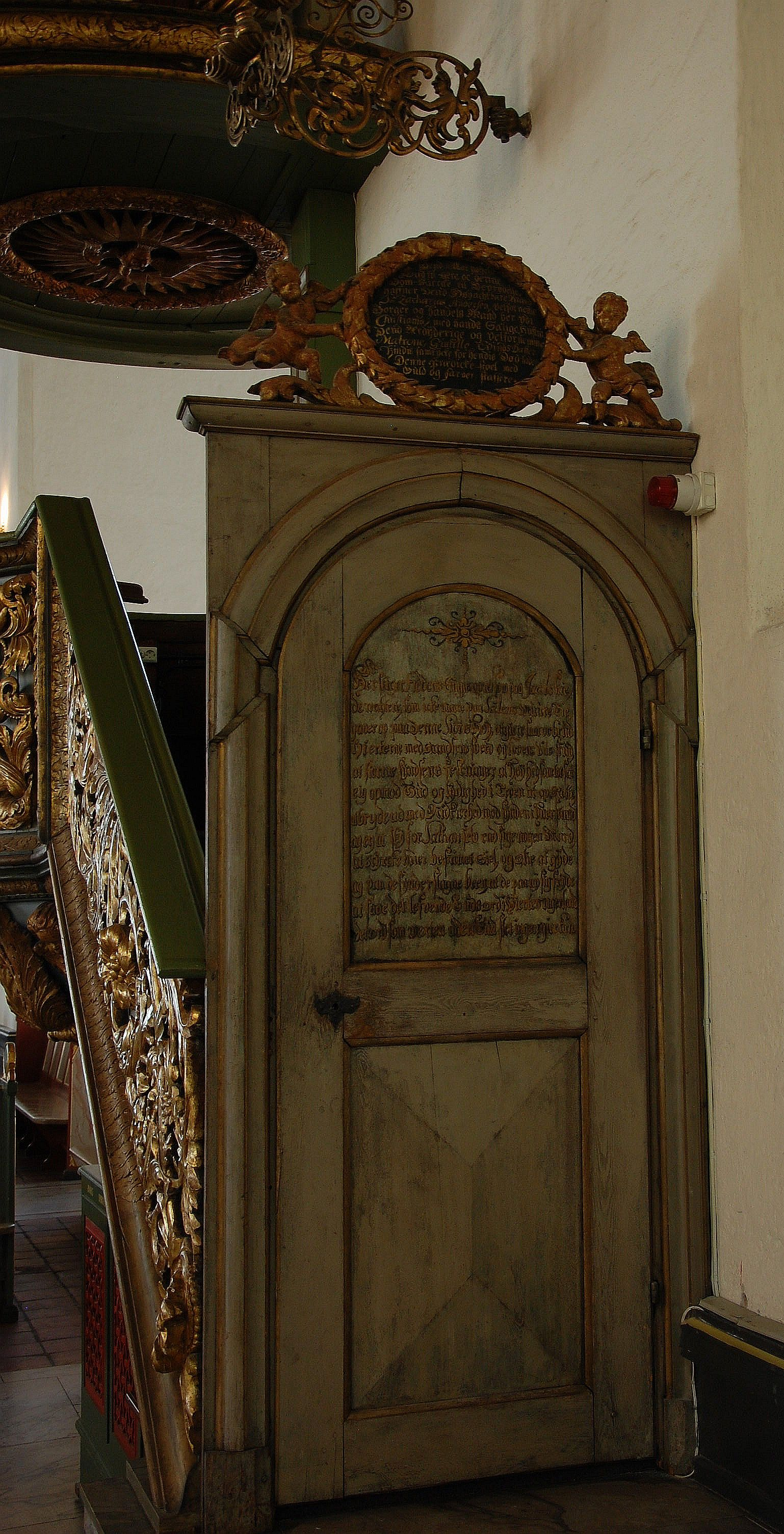 Oslo domkirke, oppgangen til prekestolen